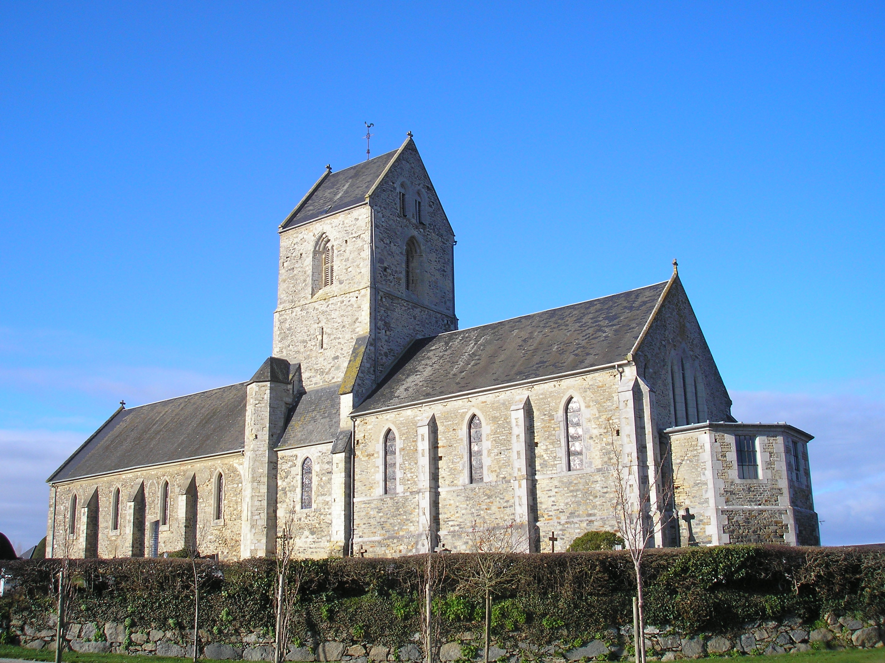 Feugères (Normandie, France). L'église Saint-Pierre.